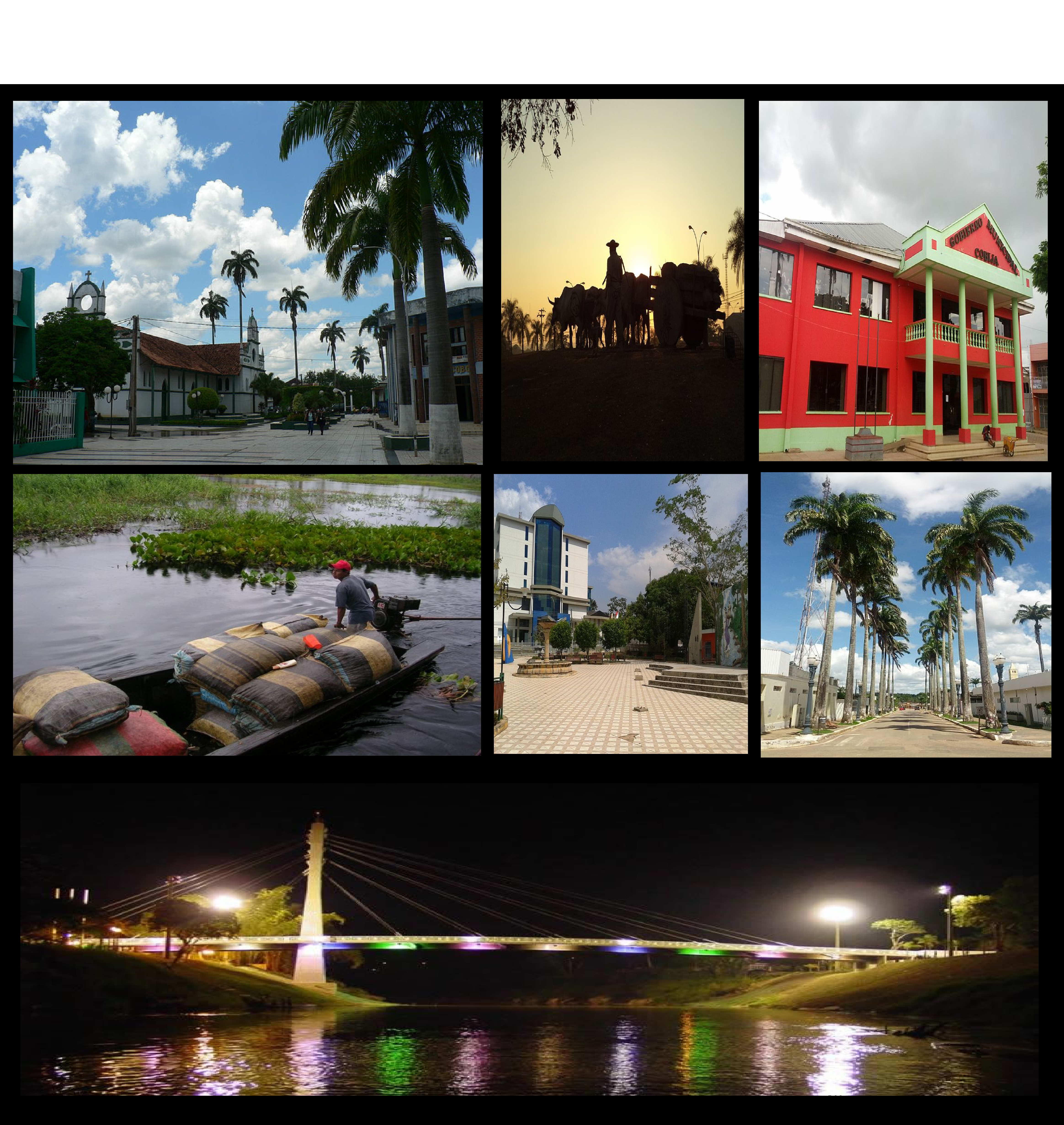 Collage de la ciudad boliviana de Cobija en el noreste de dicho país, capital del departamento de Pando frontera con Perú y Brasil.